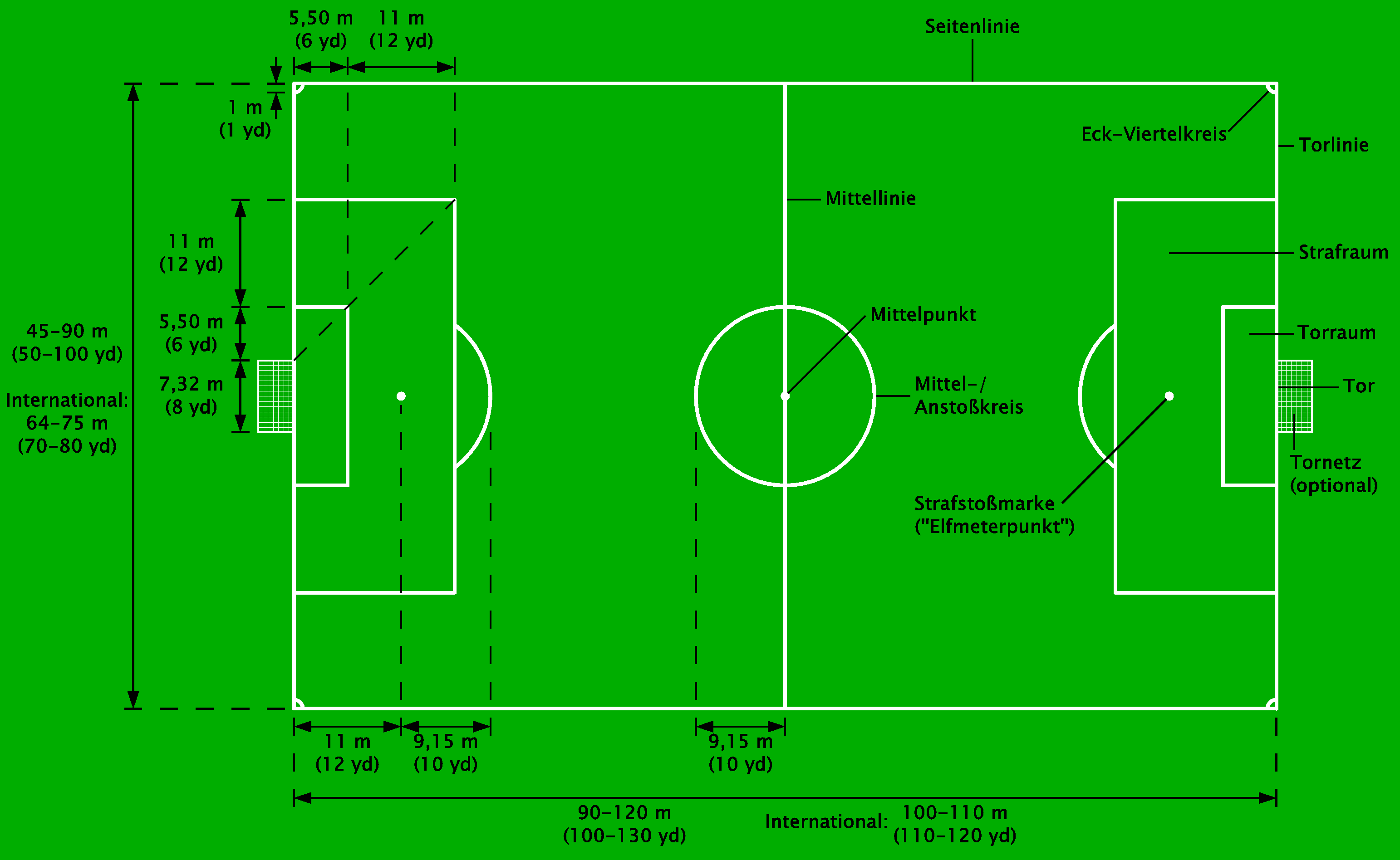 Maßstabsgetreue Skizze eines Fußballfeldes mit Abmessungen 110yd x 70yd (100,58m x 64,01m)